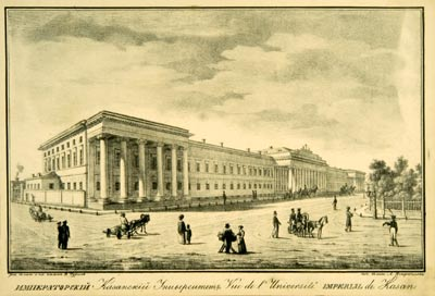 Это самое старое изображение Казанского университета, дошедшее до наших дней